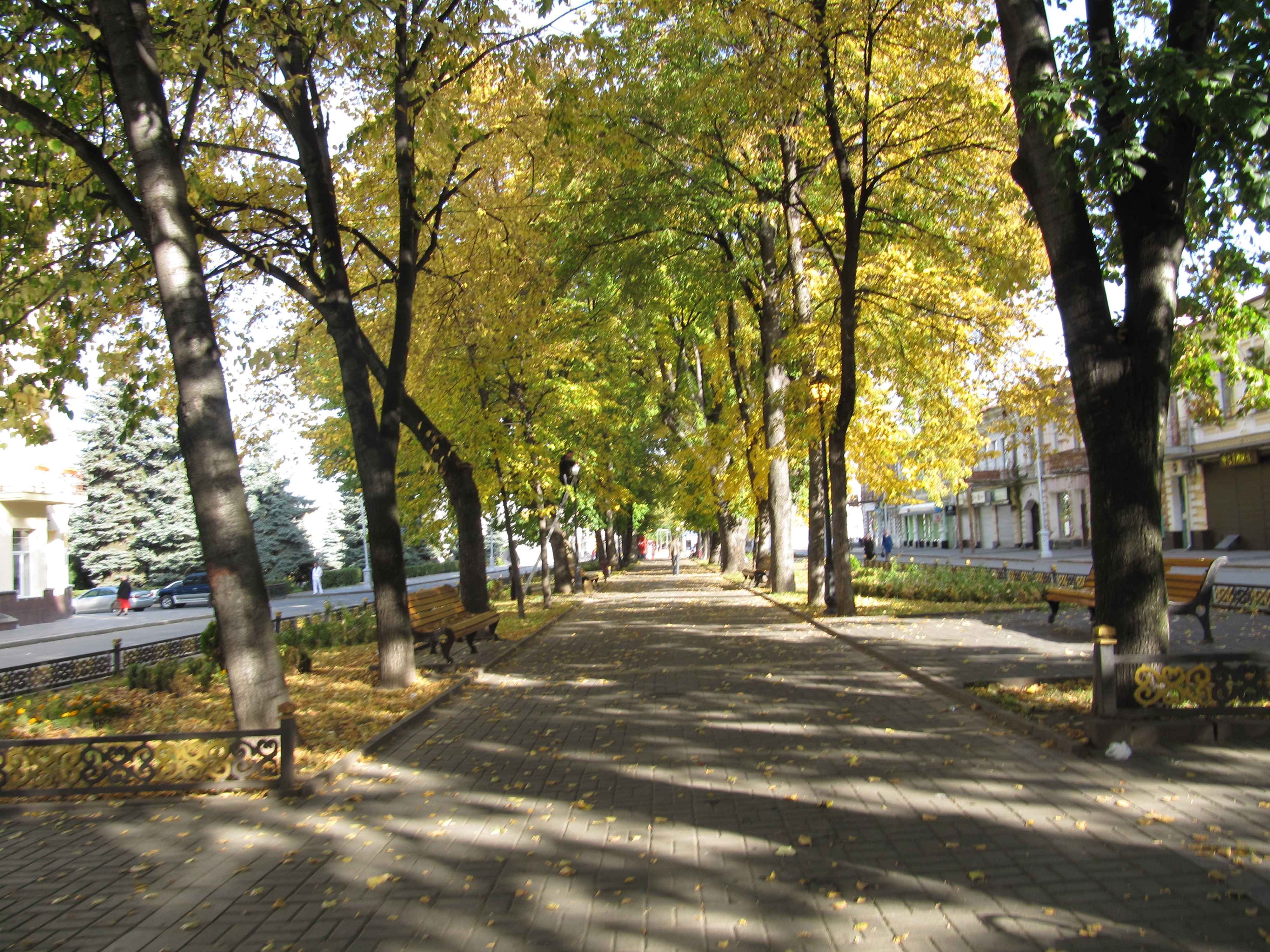 Бульвар на проспекте Мира, Владикавказ, Северная Осетия This image is related to the protected area of Russia number 1510147